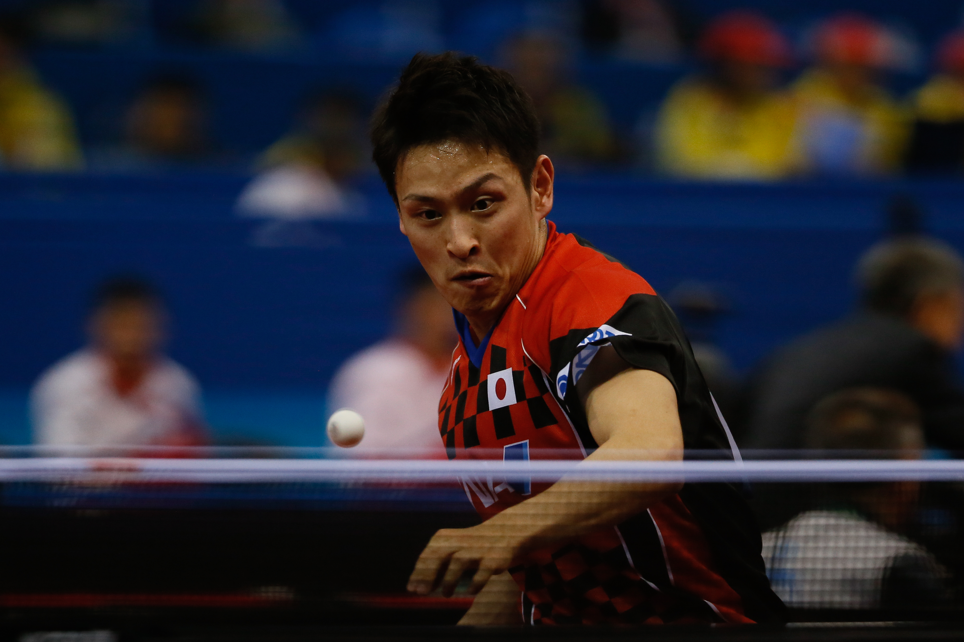 _K0K1790